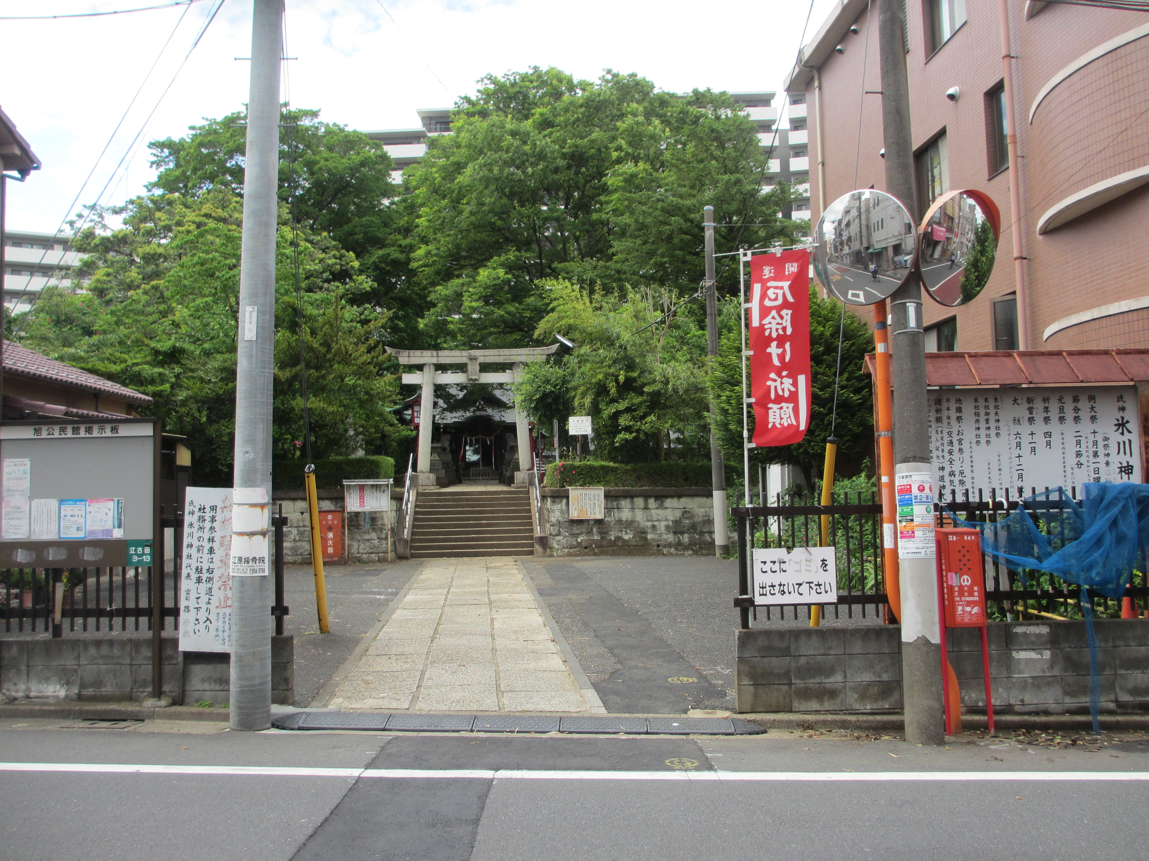 新青梅街道中野方面から環七方面へ向かい右側へ商店街上り左手